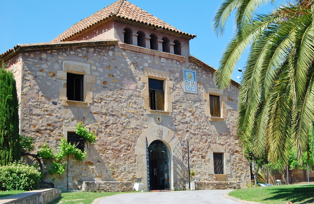 La Masia (Can Planas) (Barcelona)